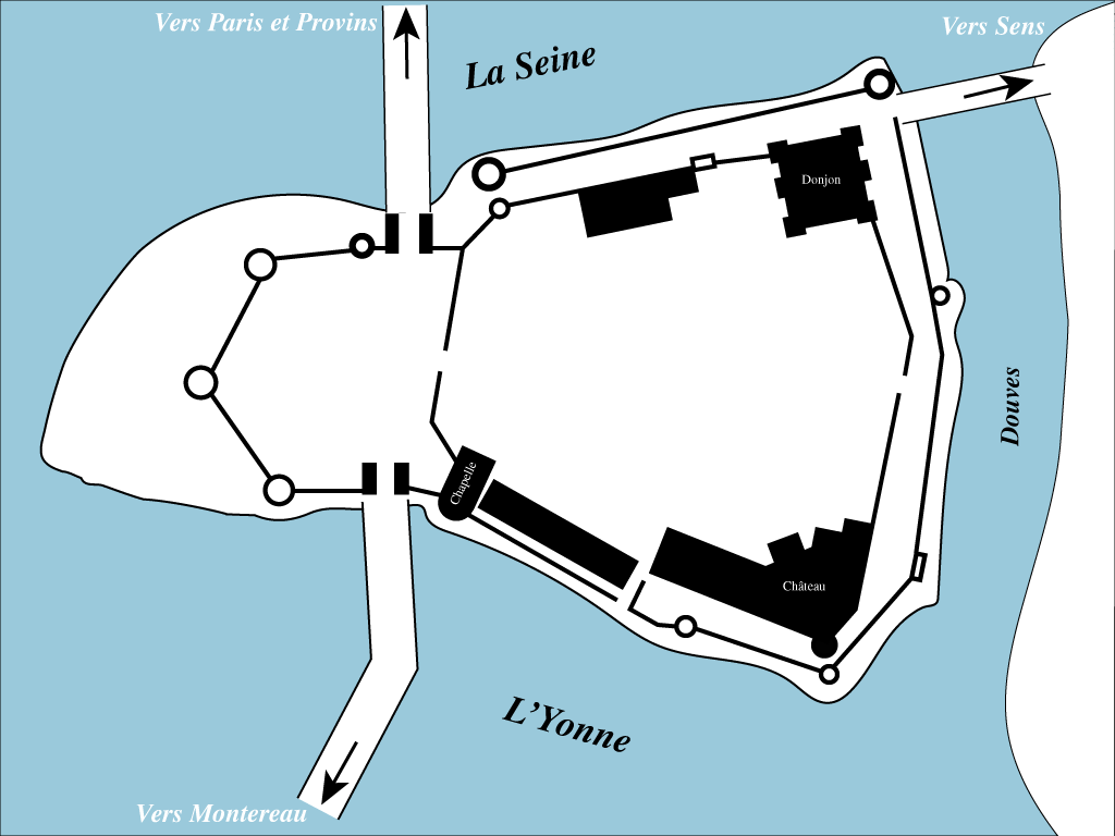 Plan du château de Montereau-Fault-Yonne en 1715 selon une gravure d'époque